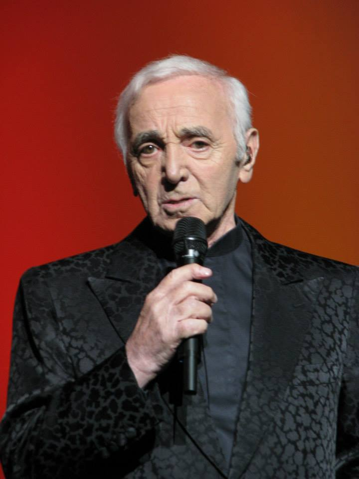 Charles Aznavour (b. May 22, 1924) – French singer